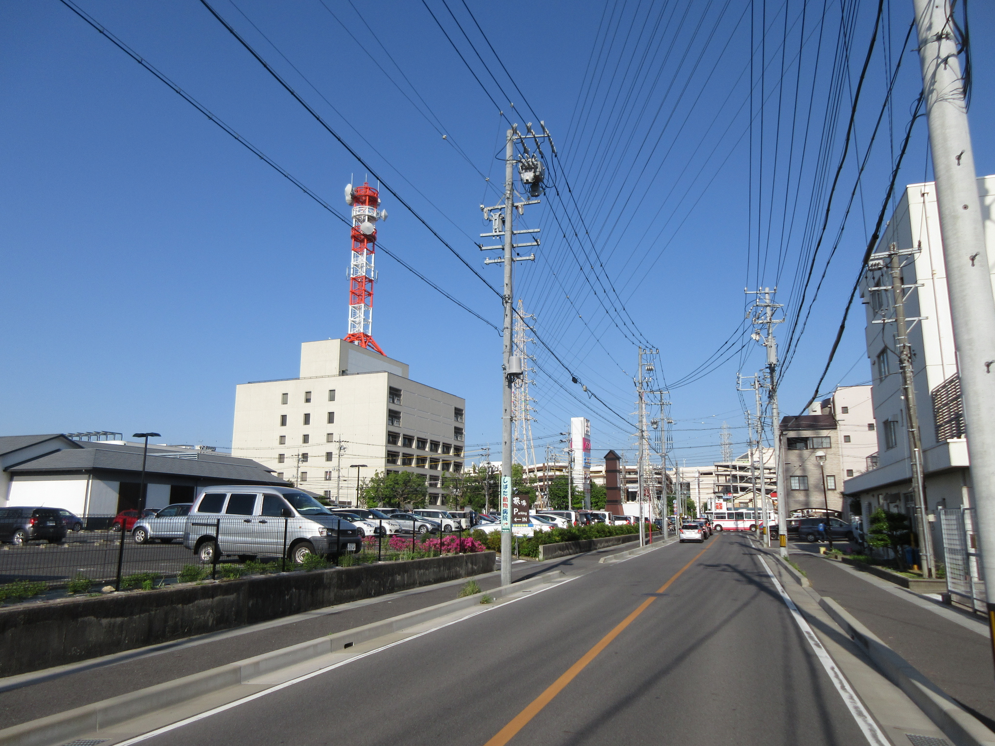 岡崎市戸崎新町。中電岡崎ビルに至る道路。